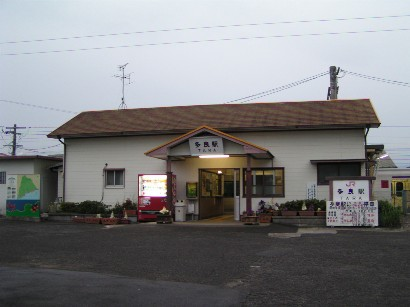 2005/03/27に投稿者が多良駅にて撮影